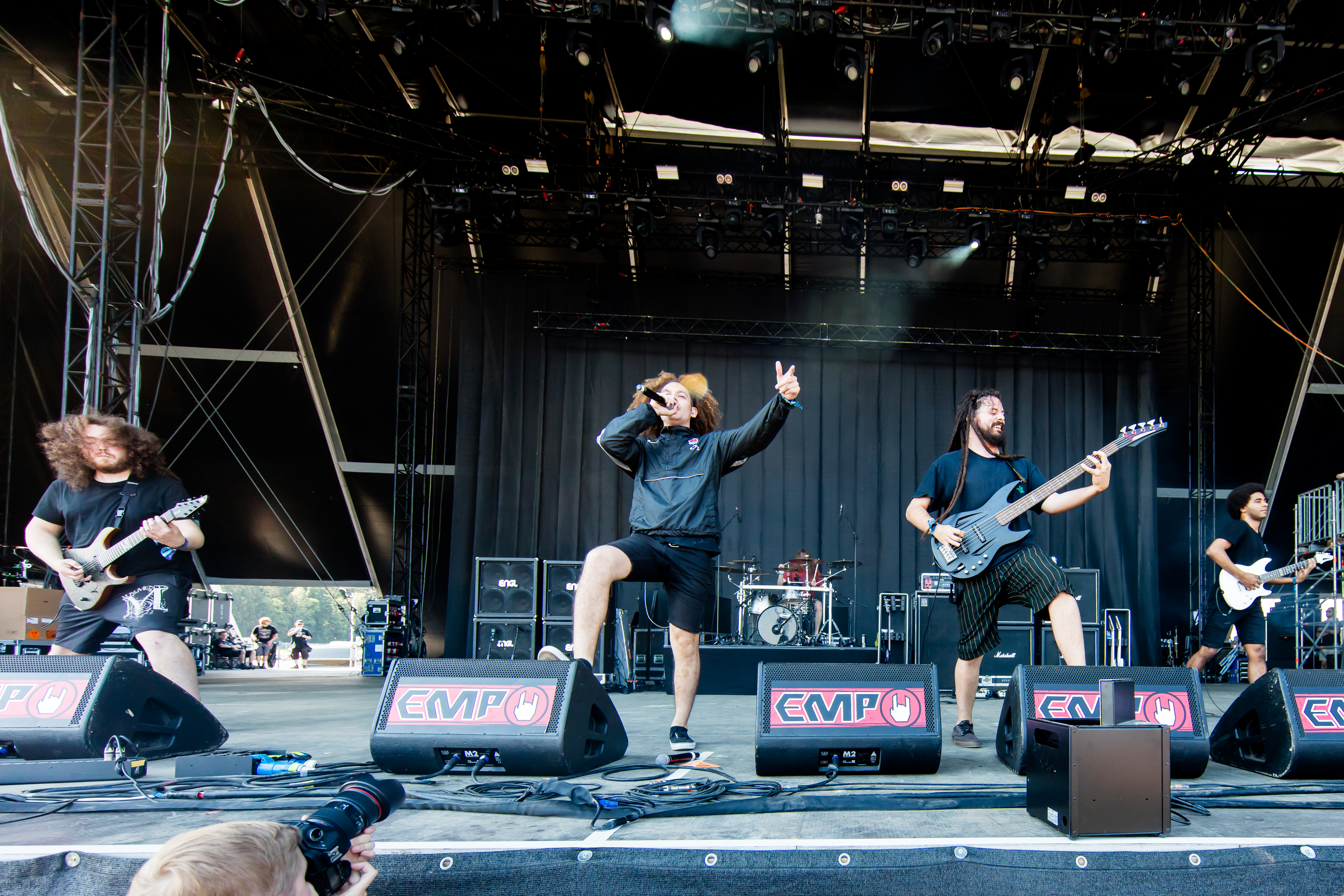 Monuments during Summer Breeze 2016 at , Dinkelsbühl, Bayern, Germany on 2016-08-18, Photo: Sven Mandel